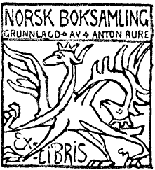 Ex libris for Anton Aures boksamling, av Gerhard Munthe.